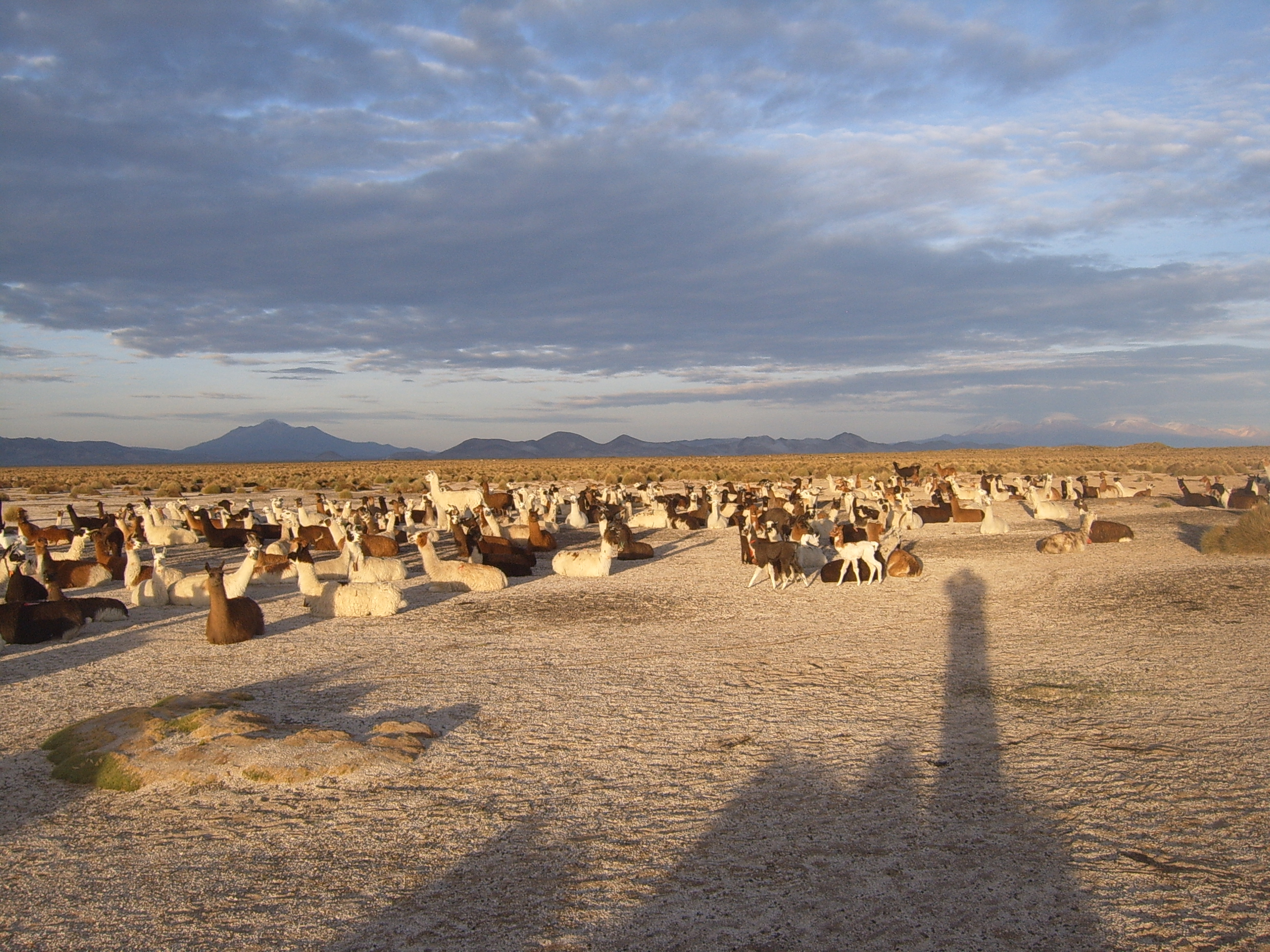 Amanecer en Sik'iri. Canton Florida